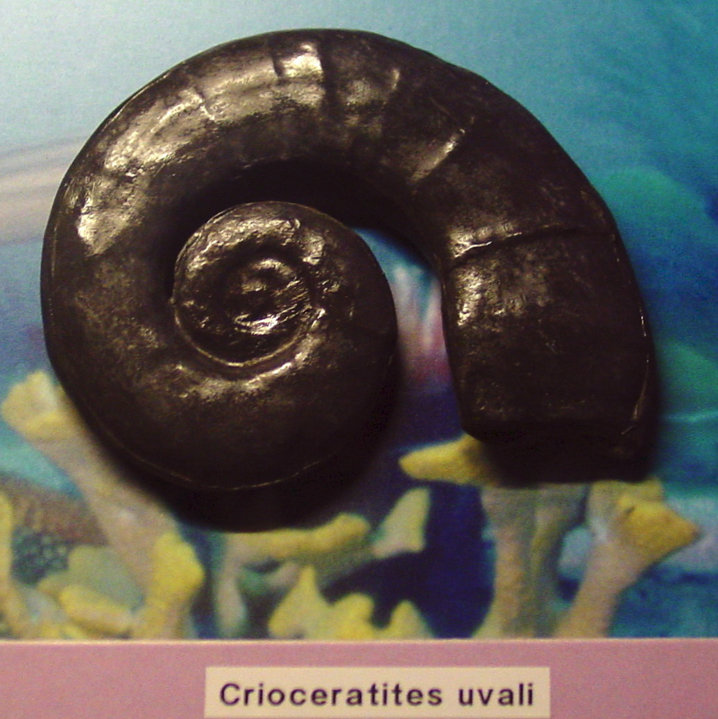 self made